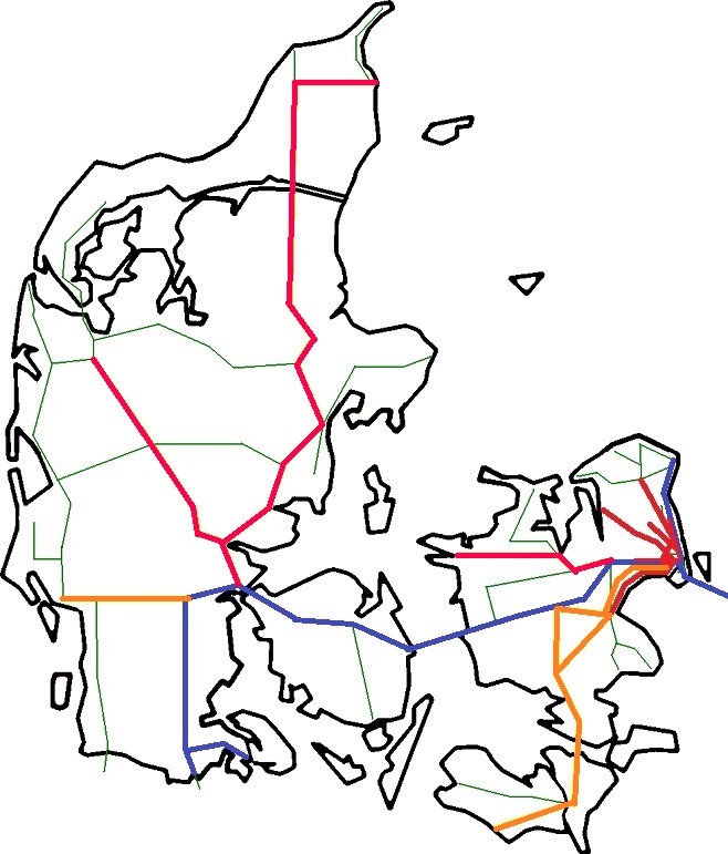 En mere klar udgave af elektrificeringen med togfonden DK og de allerede besluttede projekter